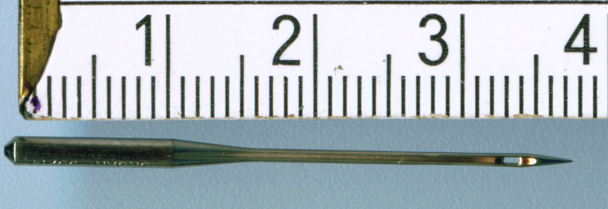 Sewing machine needle size 90/14